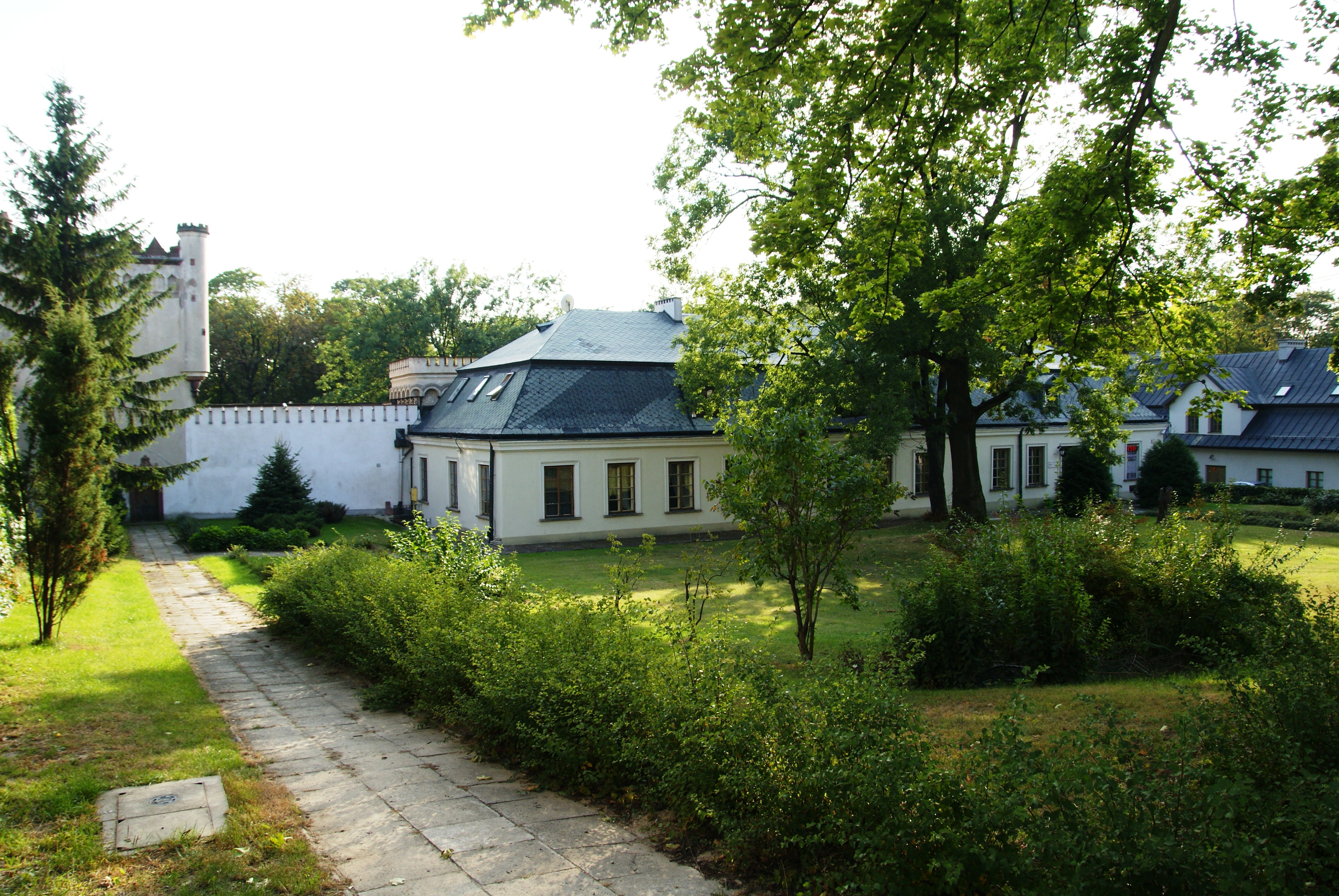 Pałac Tomasza Zielińskiego: pałac, 1752, 18148-51 oficyna, 1848-56 oranżeria, 1851-56 ogrodzenie, mur z bramą i basztą „Plotkarką”, 1850-56 ogród, XVIII, 1854 Kielce ul. Zamkowa 5, Kielce 379/1-3 z 3.01.1.